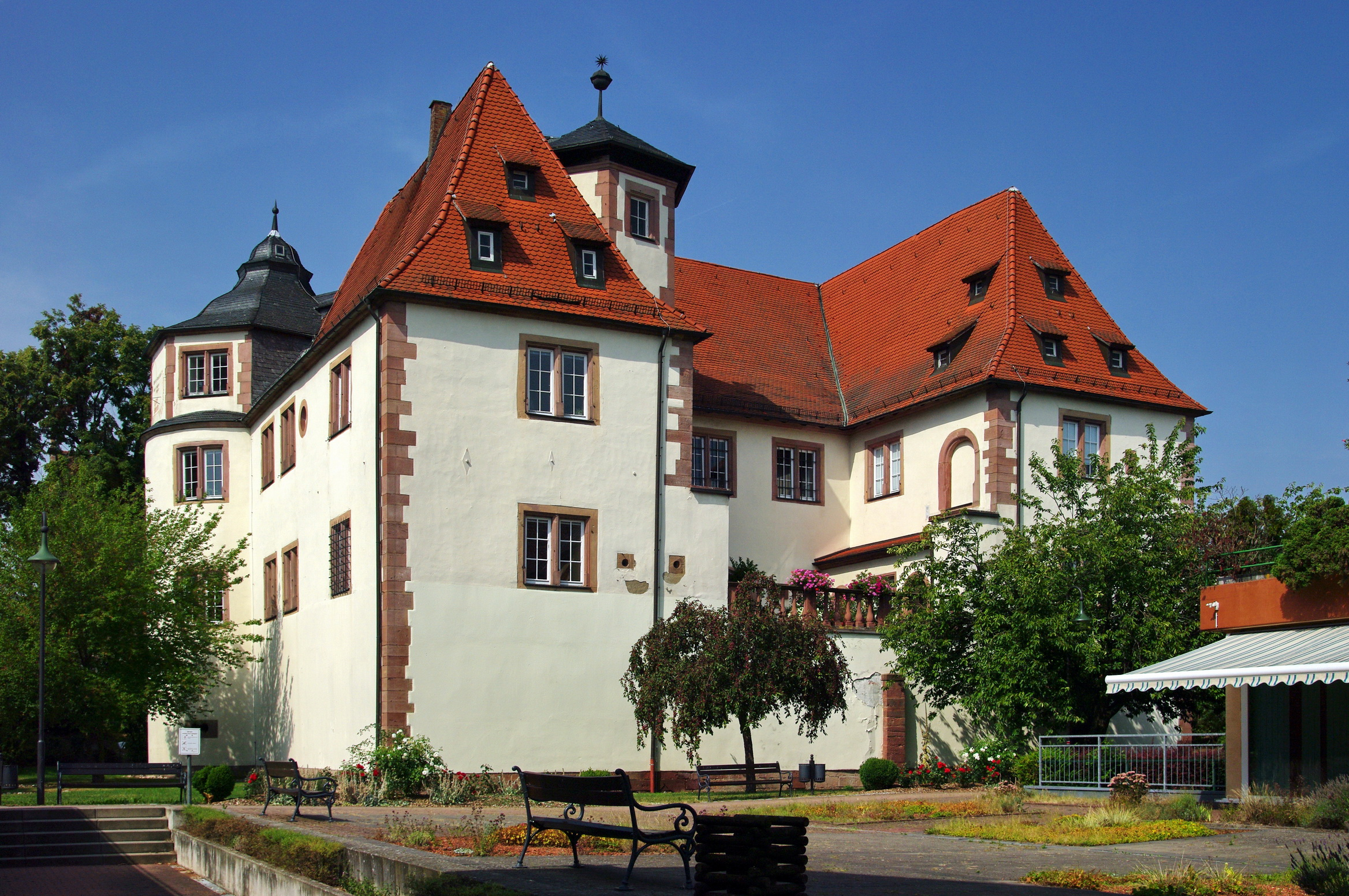 Rathaus Hardheim von der Südseite gesehen